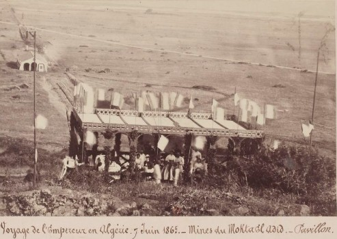 Voyage de l'Empereur en Algerie Juin 1865 - Mines du Mokta Hadid - Pavillon